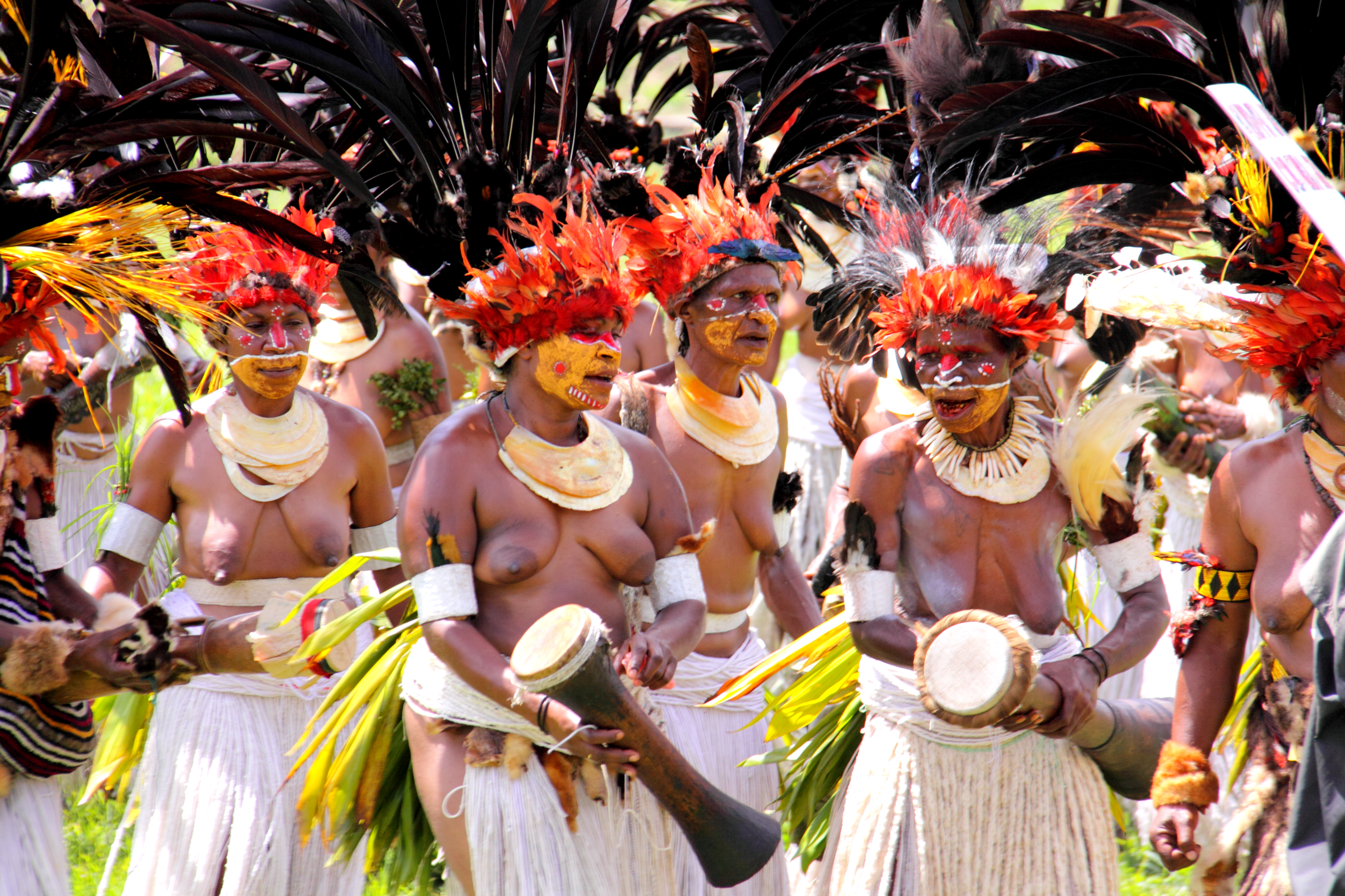 papouasie, festival de mount hagen, Mindima